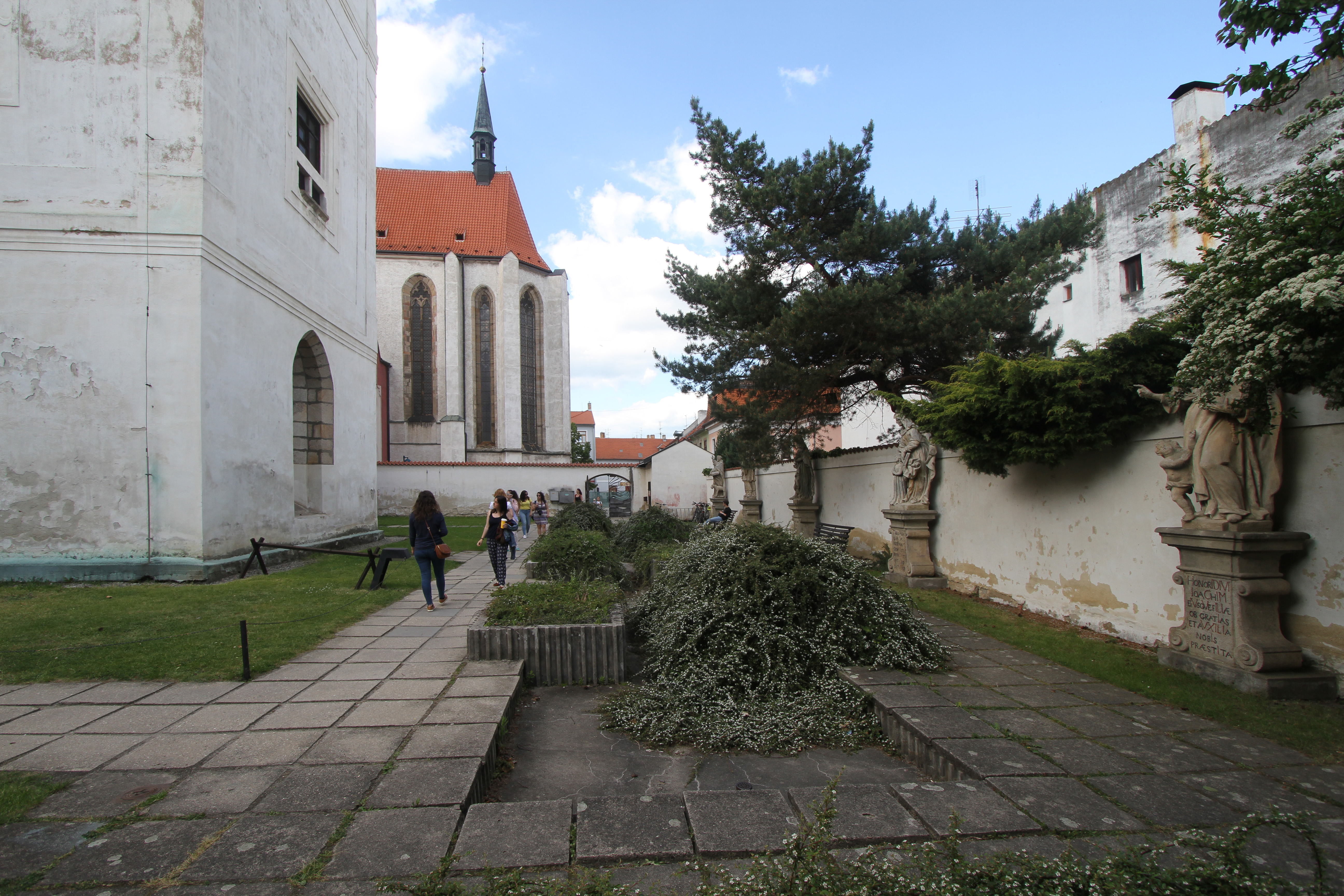 Dominikánský konvent v Českých Budějovicích